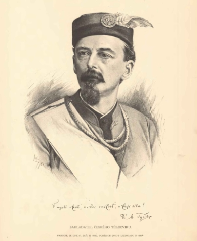 Portréty českých osobností od Jana Vilímka